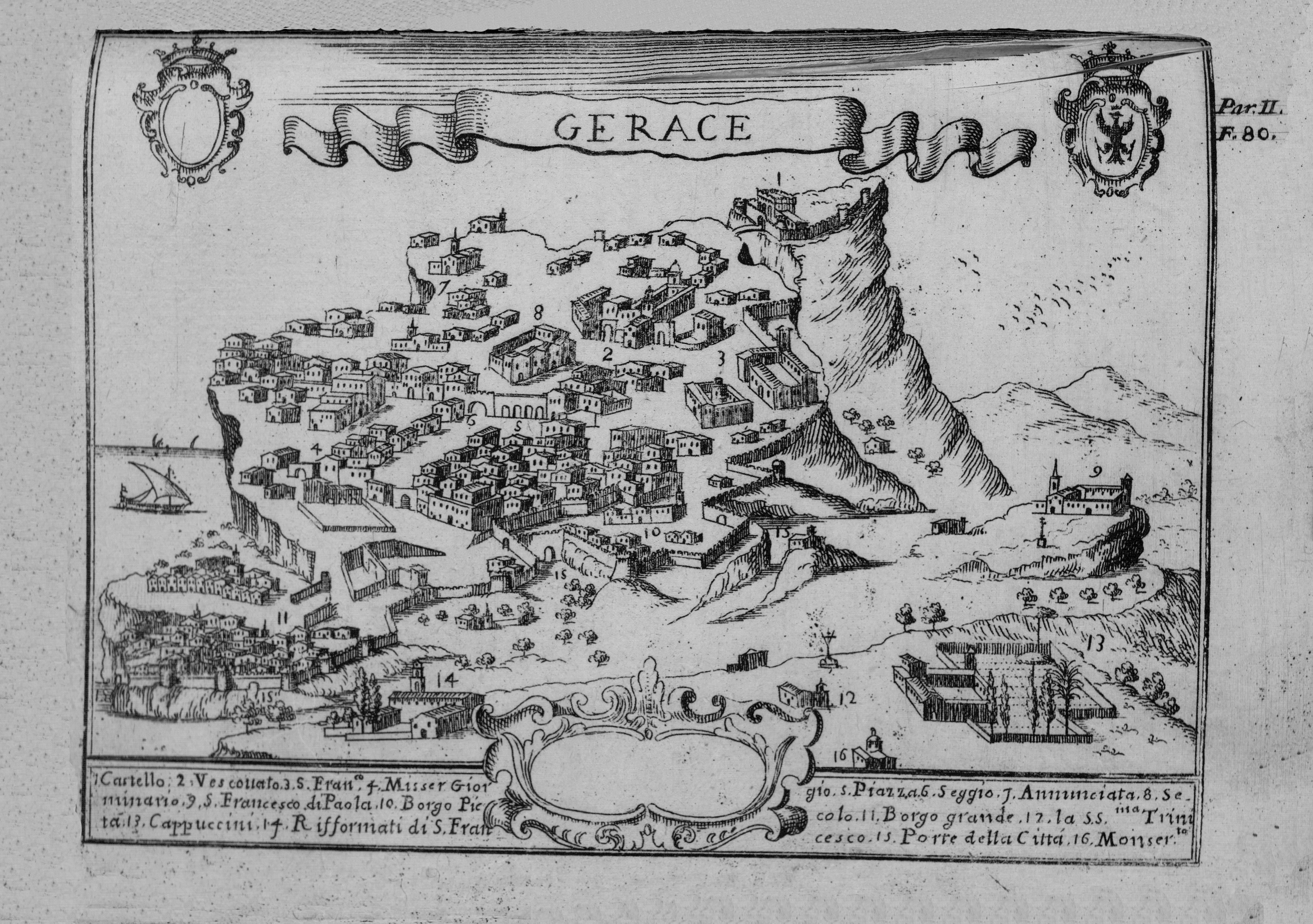 Autor: Pacichelli, Giovanni Battista, 1641-1702 Descripción bibliográfica: Il regno di Napoli in prospettiva : diviso in dodeci provincie, in cui si descrivono la sua Metropoli Fidelissima città di Napoli ... Opera postuma divisa in tre parti / dell'abatte Gio. Battista Pacichelli ; Parte prima [-terza] ... Del regno di Napoli in prospettiva / dell'abate Pacichelli. Parte prima. - In Napoli : nella Stamperia di Michele Luigi Mutio, 1703. - v. : principalmente il.; 4º . - Inic. adorn. y frisos dec. - Grab. calc. y h. pleg. grab. calc. de mapas de Cassianus de Silva. Ilustrador: Cassiano De Silva, Francesco, il. Impresor: Muzio, Michele Luigi, imp. Lugar de impresión: Italia. Nápoles Localización: Vea la ilustración en su contexto